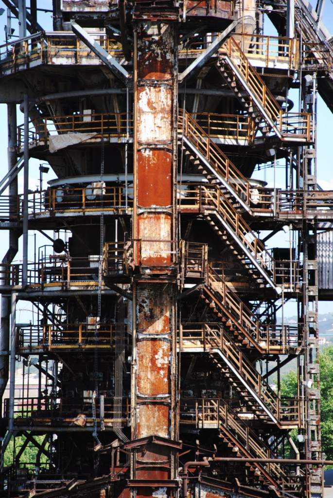 Photo: Jérémie Maire - BilbaoKL